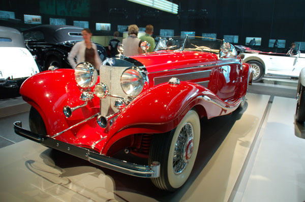 Mercedes-Benz 500 K-Spezial-Roadster, Mercedes-Benz Museum, Stuttgart